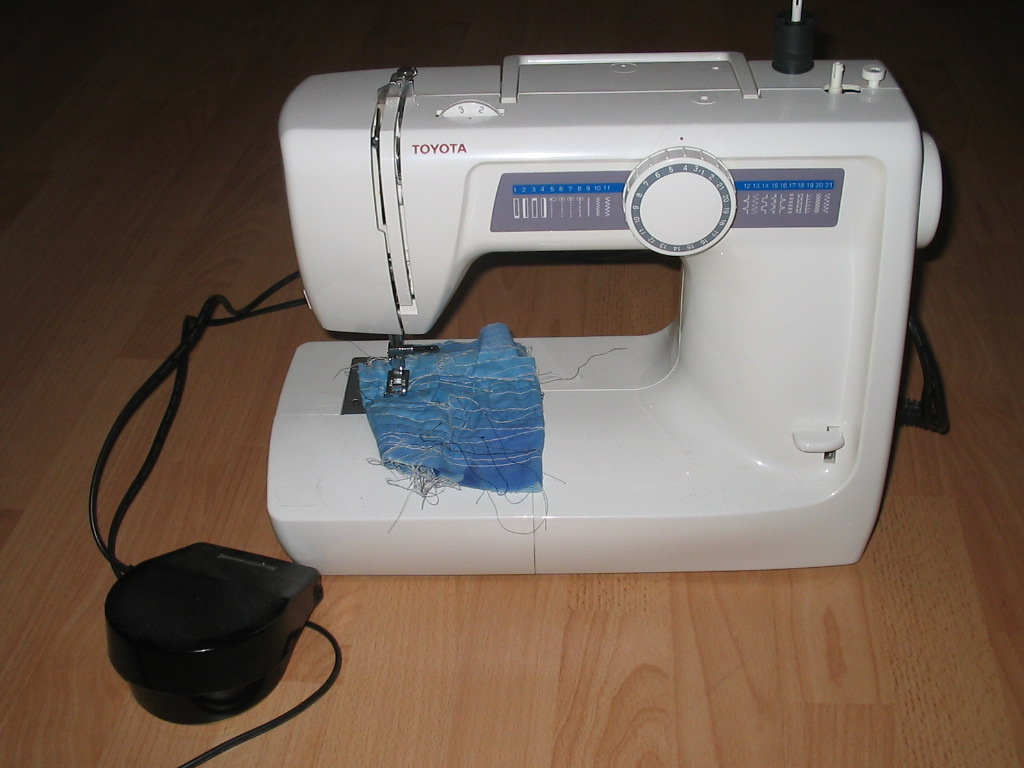 (nee, deze is van mijn vriendin)